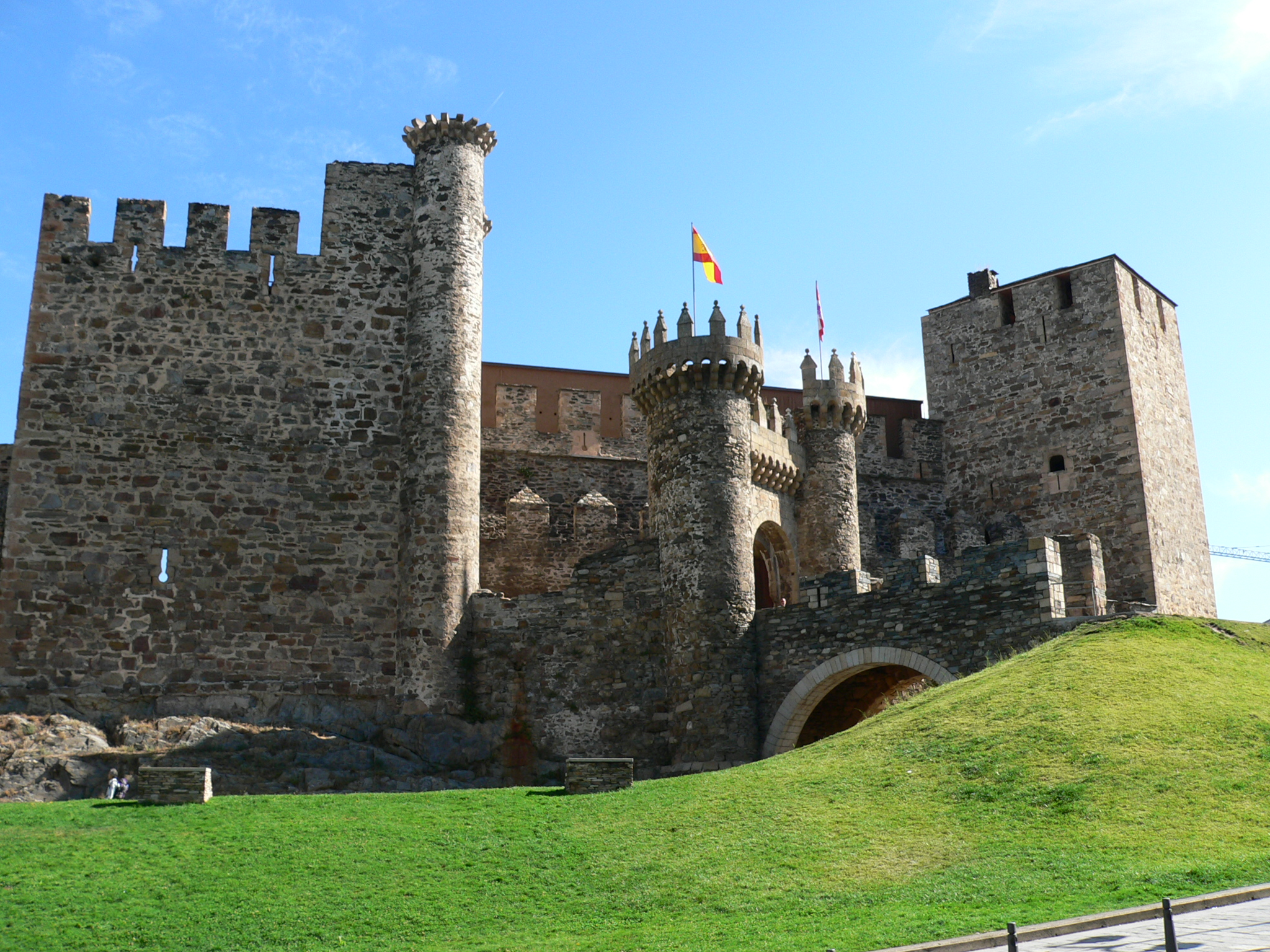 Castillo templario de Ponferrada (provincia de León, Castilla y León).